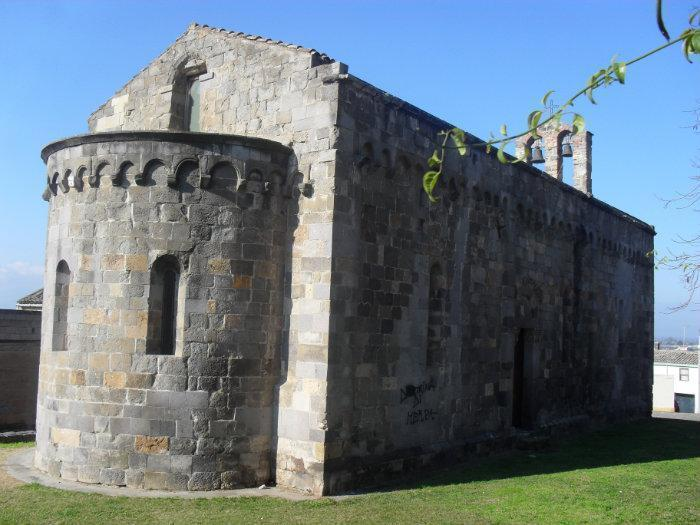 Samassi San Gemiliano